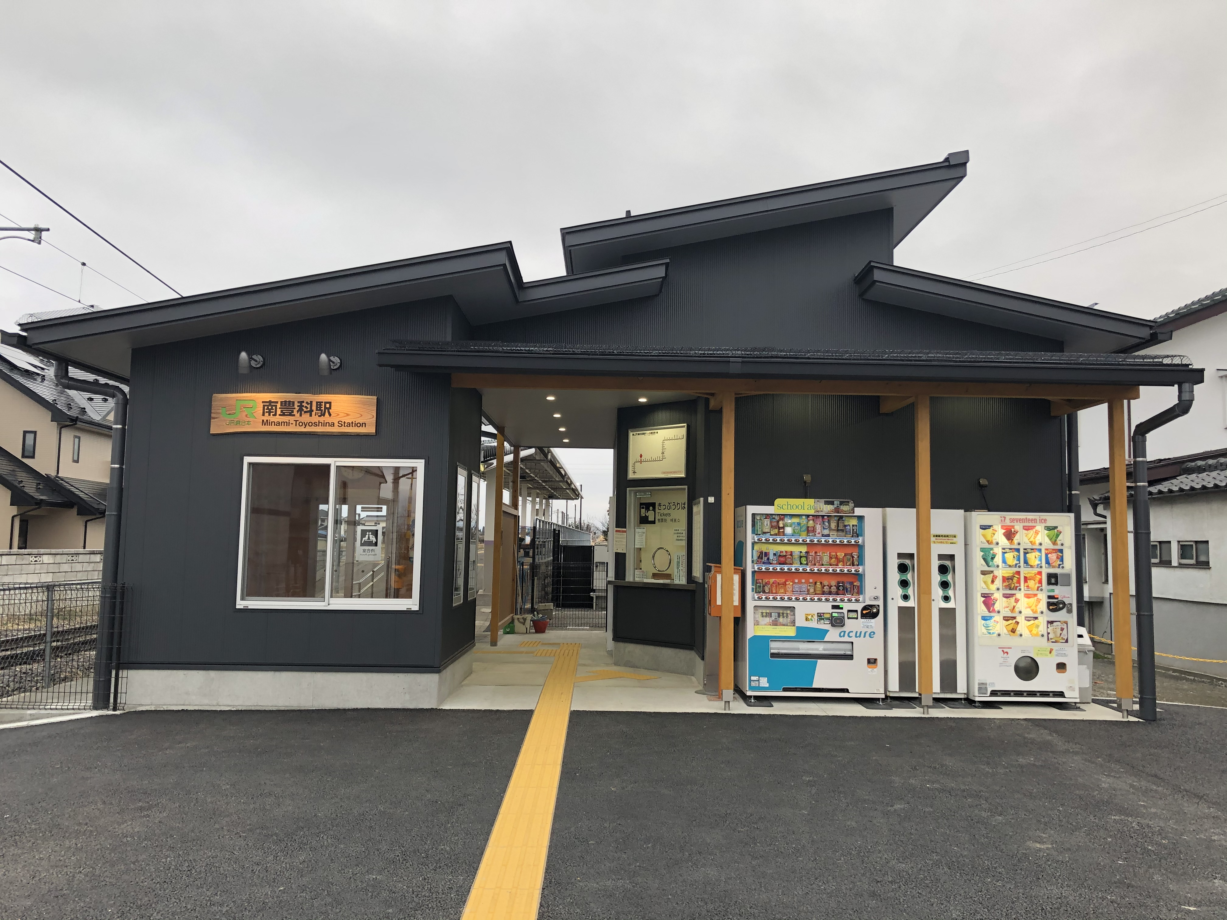 JR東日本大糸線の南豊科駅の駅舎です。